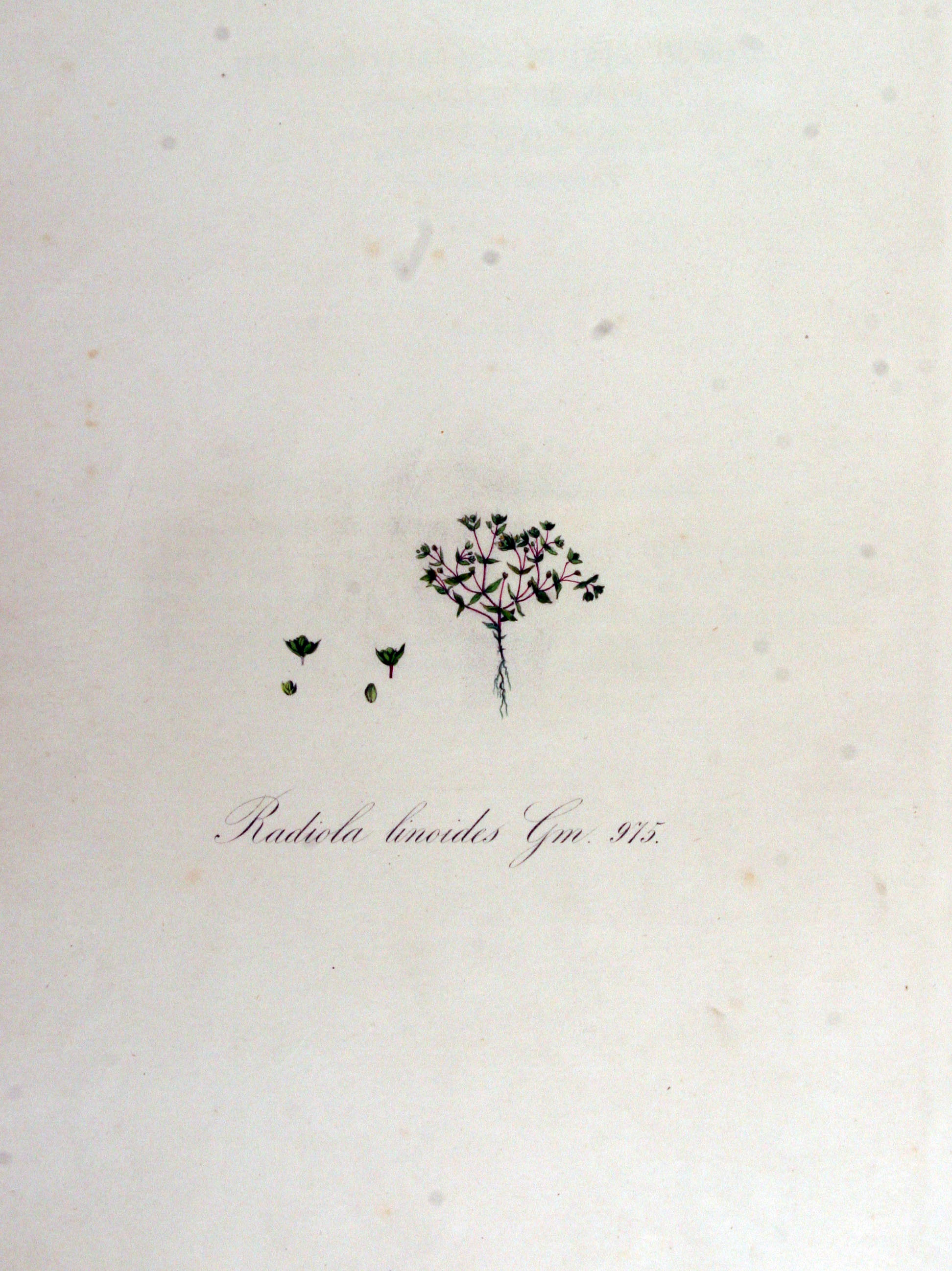 Radiola linoides Roth